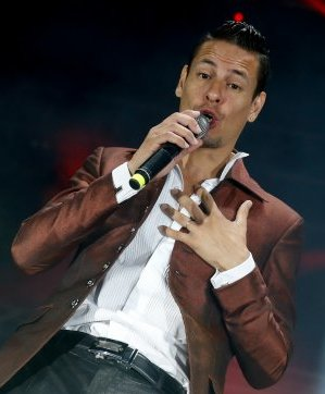 Rodrigo Tapari actual vocalista de la banda desde el año 2002